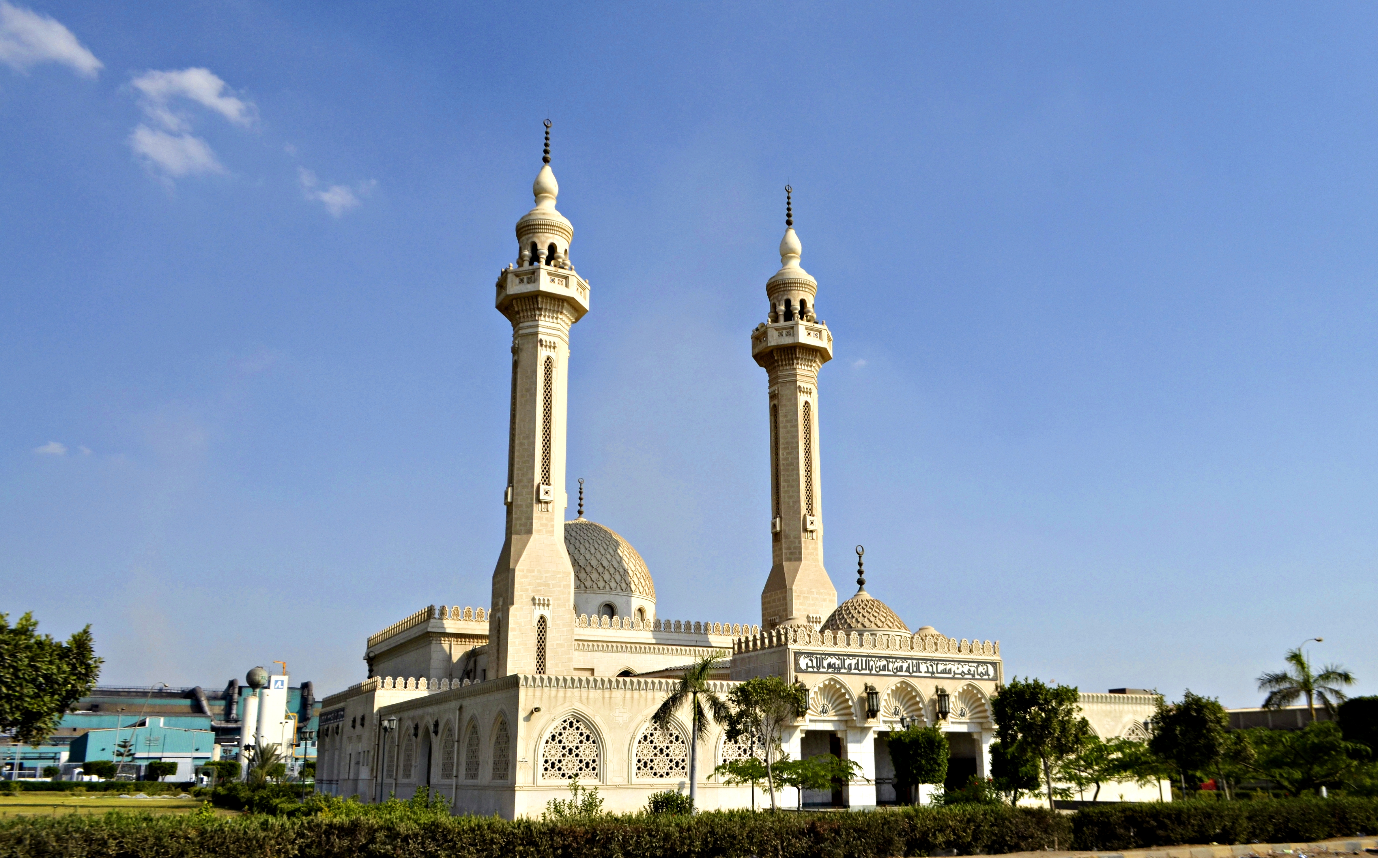 مسجد عبد العزيز عز، مدينة السادات